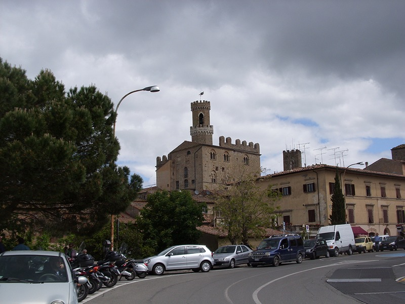 Volterra